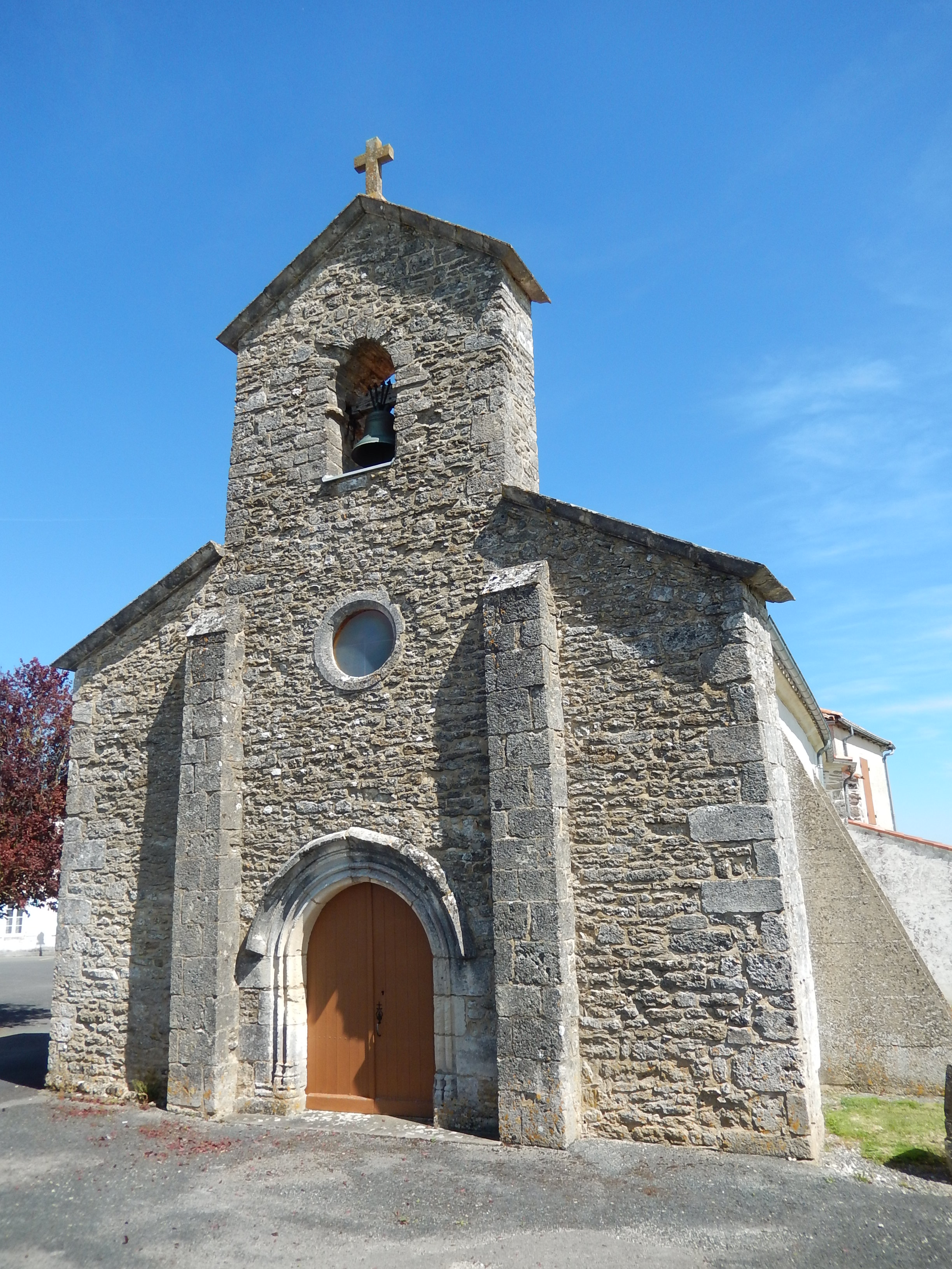 L'église de Chervettes.